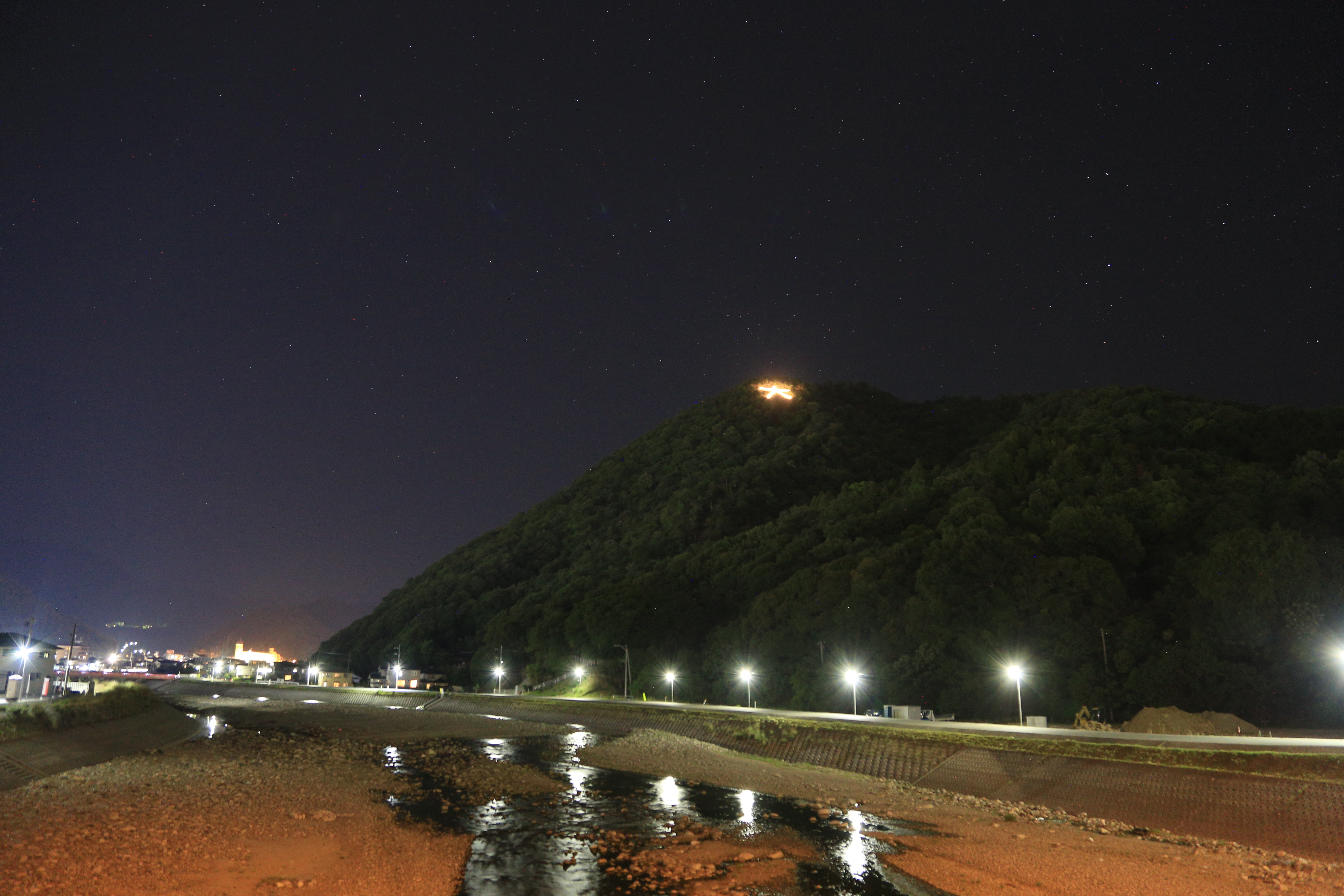 広島市安佐北区可部の高松山で毎年5月末に行われる大文字焼き